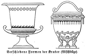 Formen der Kater